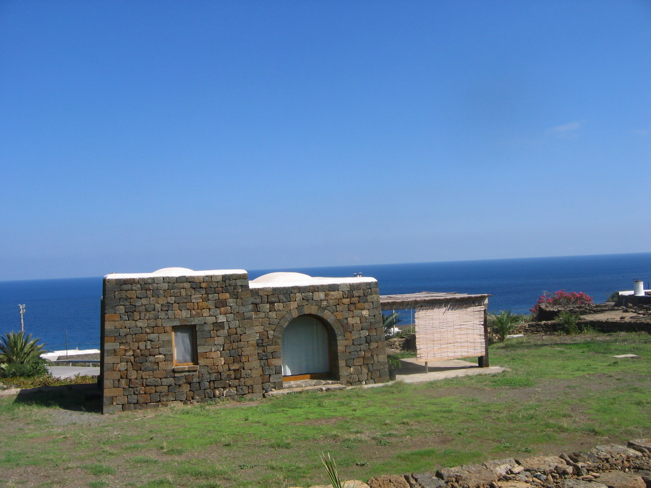 Typische woningen in Arabische stijl-Pantellaria